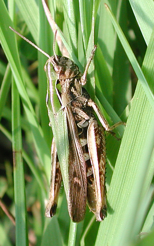 Omocestus viridulus, female, Bunter Grashüpfer, NSG Kirchwerder Wiesen, Elbmarsch bei Hamburg, Germany